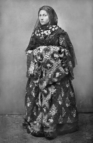 Аварка.